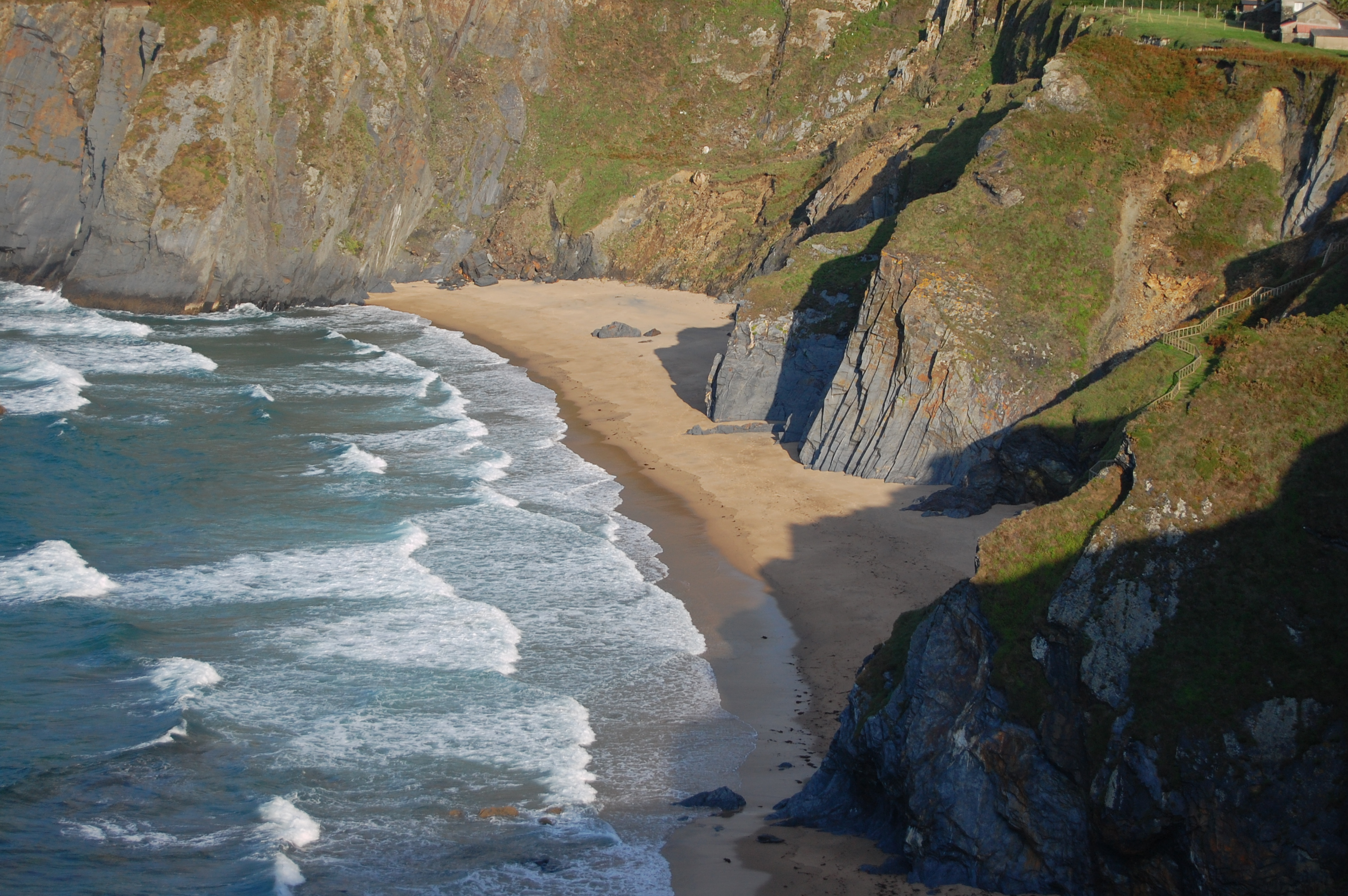 Praia de Picón na parroquia de Loiba (Ortigueira), pertencente ó Lugar de Importancia Comunitaria Estaca de Bares. This is a photography of a Special Area of Conservation in Spain with the ID: ES1110010. Natura2000 entry, EEA entry